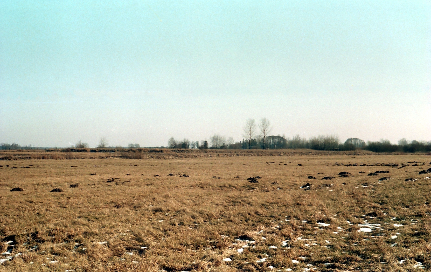 Grodzisko na łąkach, tzw. "Wały" w 1993 roku.